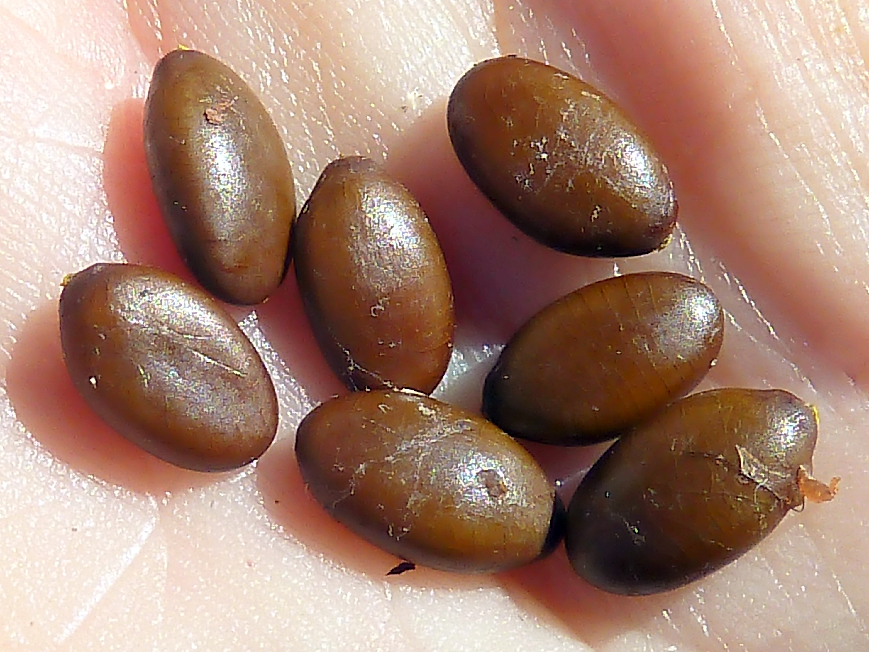 Gleditsia triacanthos (Acacia de tres espinas) - Semillas sueltas. - Ornamental/cultivado, Plaza de Roma (hoy día Pza de Manuel Becerra), Madrid Capital (España).